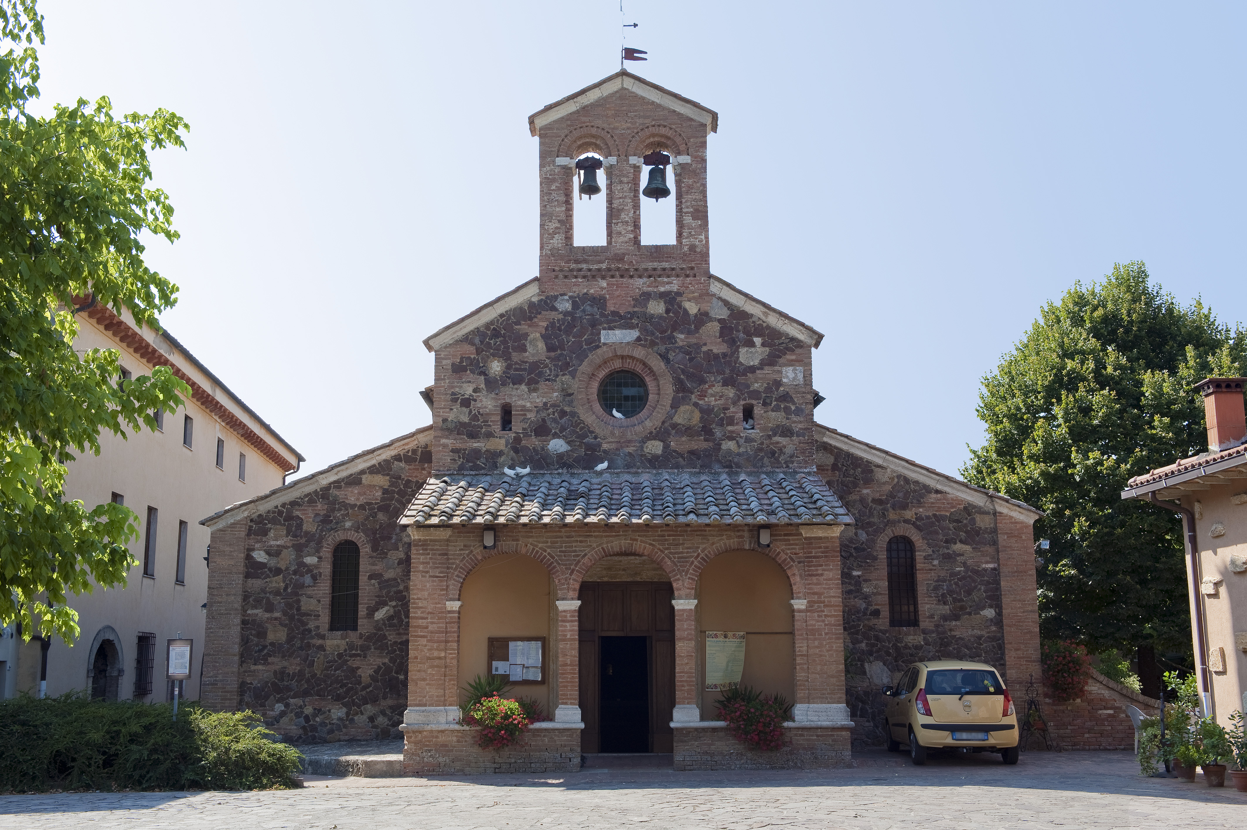 Chiesa di Sant'Ansano a Dofàna, Castelnuovo Berardenga